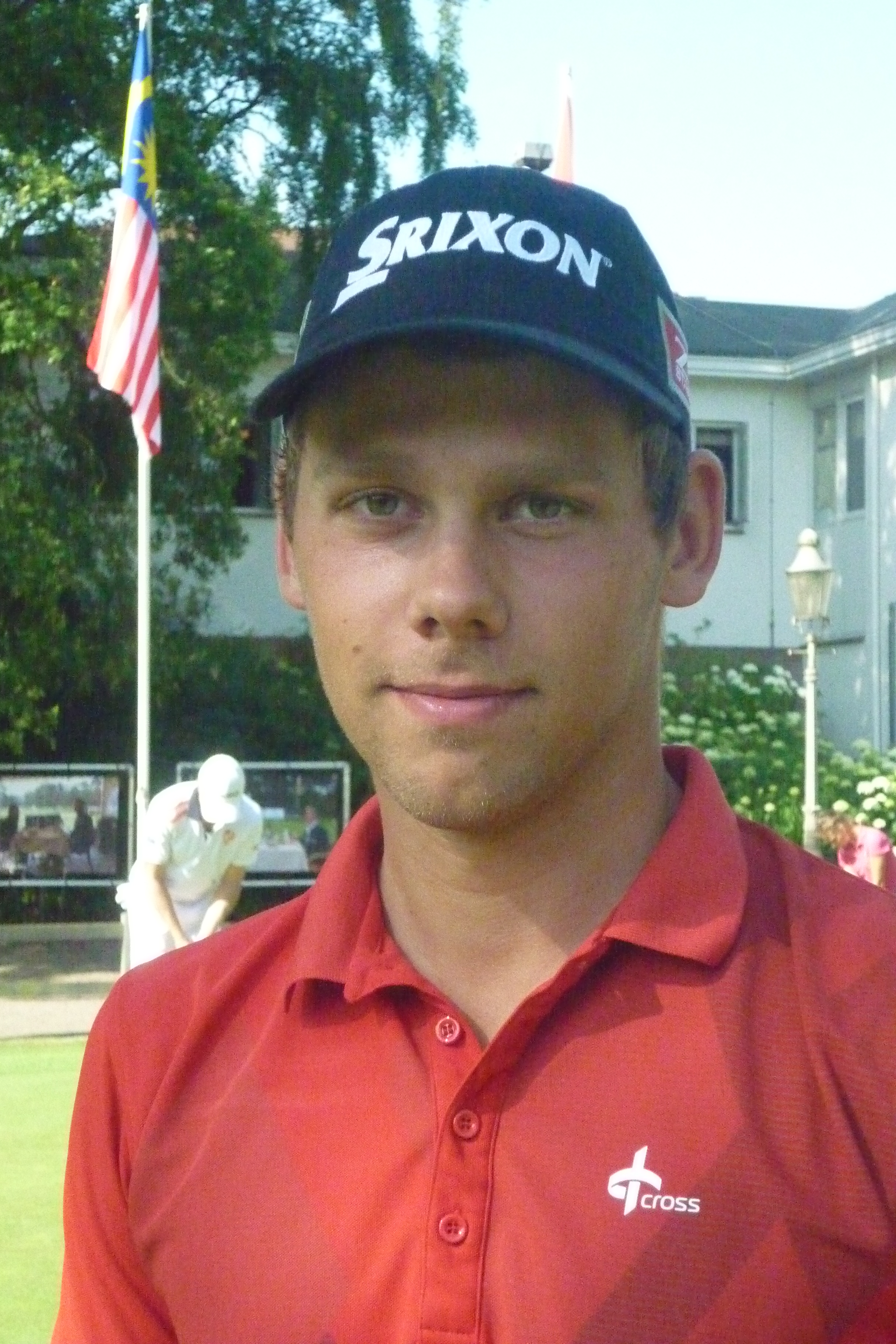 Rowin Caron op Toxandria